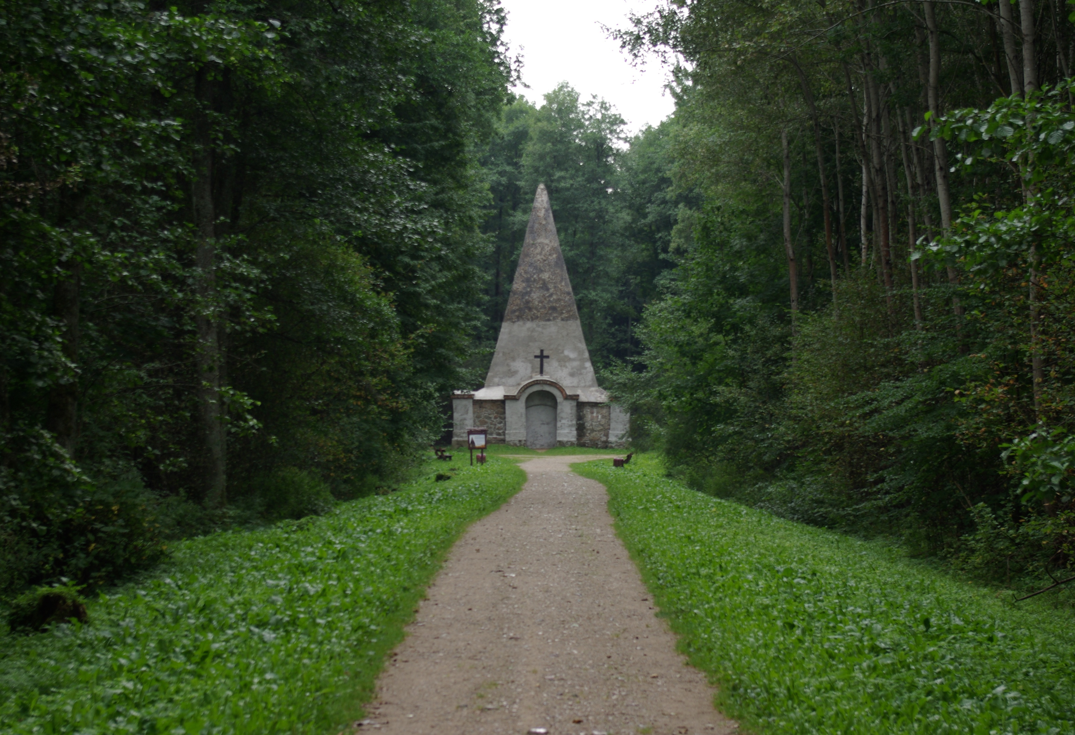 Piramida w Rapie